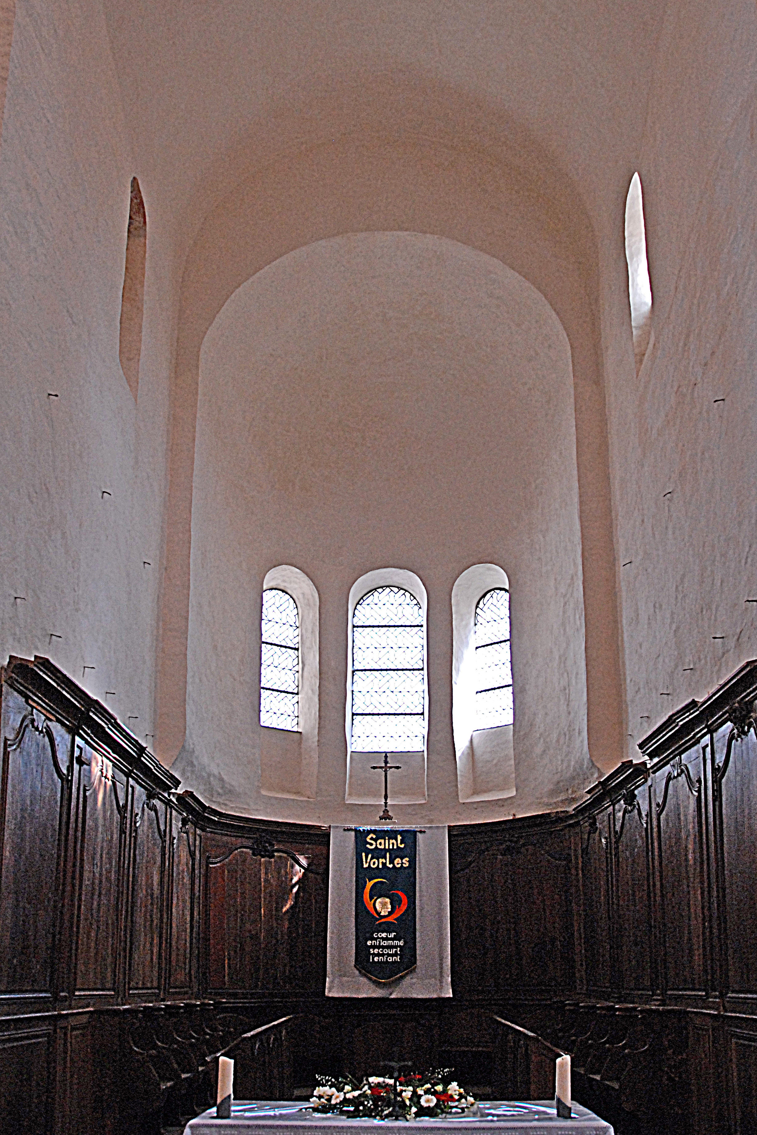 St-Vorles de Châtillon-s-S, Chor